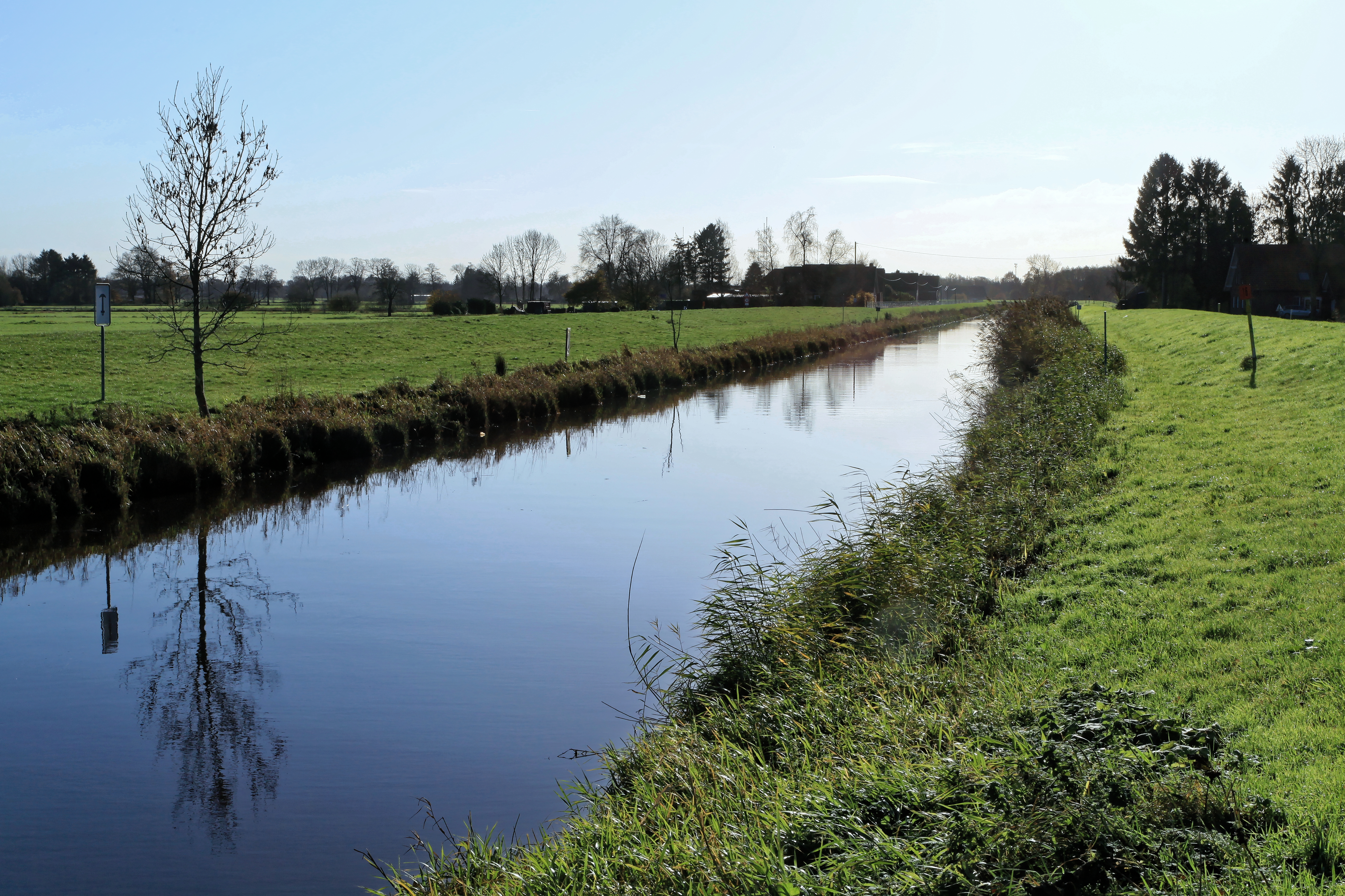 Blick von der Tobiasbrücke auf den Hauptfehnkanal zwischen Ostrhauderfehn und Rhauderfehn